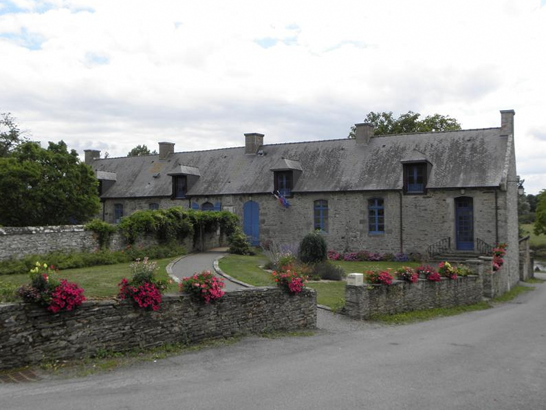 Mairie de La Chapelle-de-Brain (35).